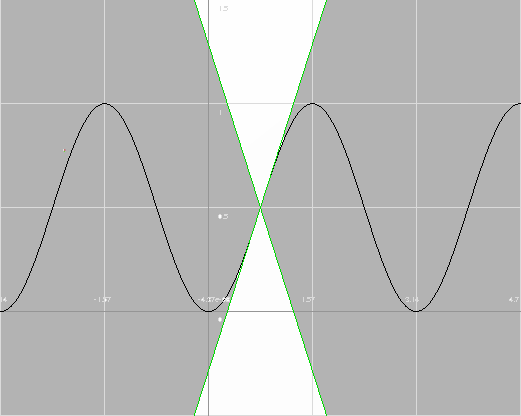 Bild av en Lipschitz-kontinuerlig funktion som innesluts av två koner. Ifall en funktion kan inneslutas i två koner med en gemensam spets i vilken punkt som helst på funktionen, så är funktionen Lipschitz-kontinuerlig.